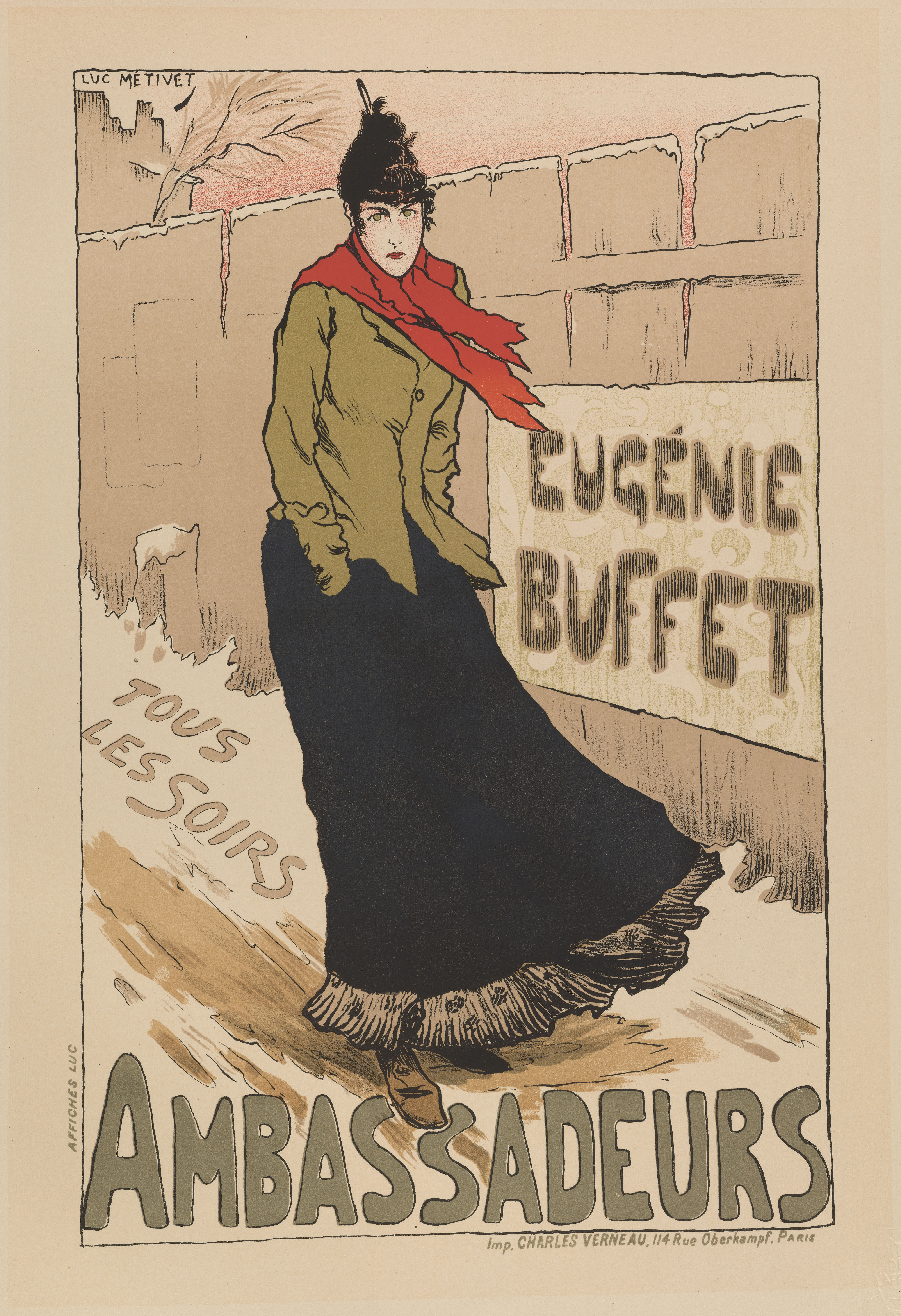 Affiche pour le Concert des Ambassadeurs. Planche 22 du "Les Maîtres de l'Affiche : publication mensuelle contenant la reproduction des plus belles affiches illustrées des grands artistes, français et étrangers", éditée par L'Imprimerie Chaix, Premier Volume, Paris, 1896.